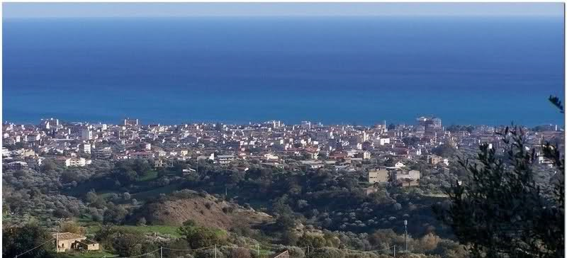 Panorama Siderno